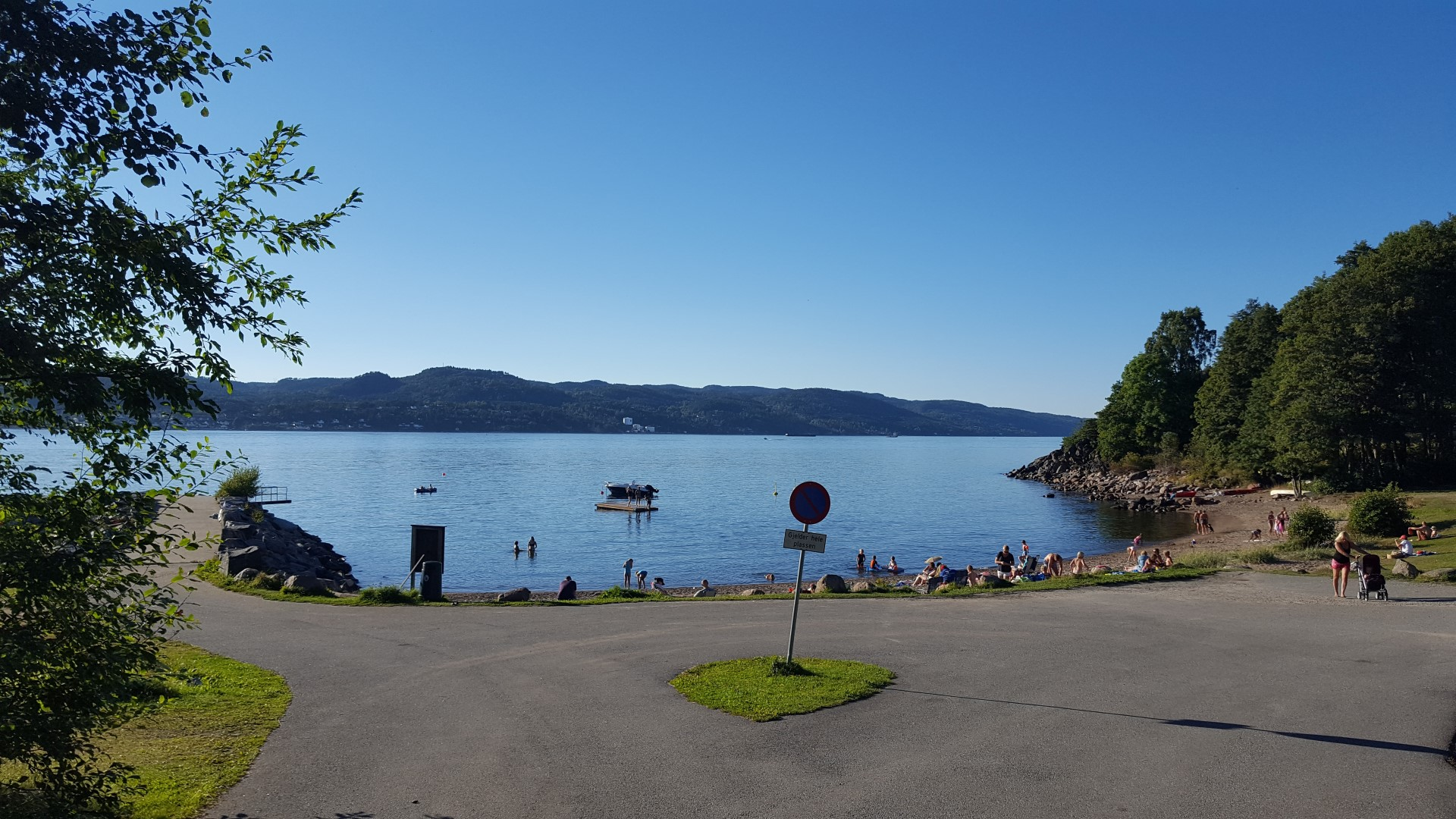 Utsikt over Oslofjorden fra Krokstrand